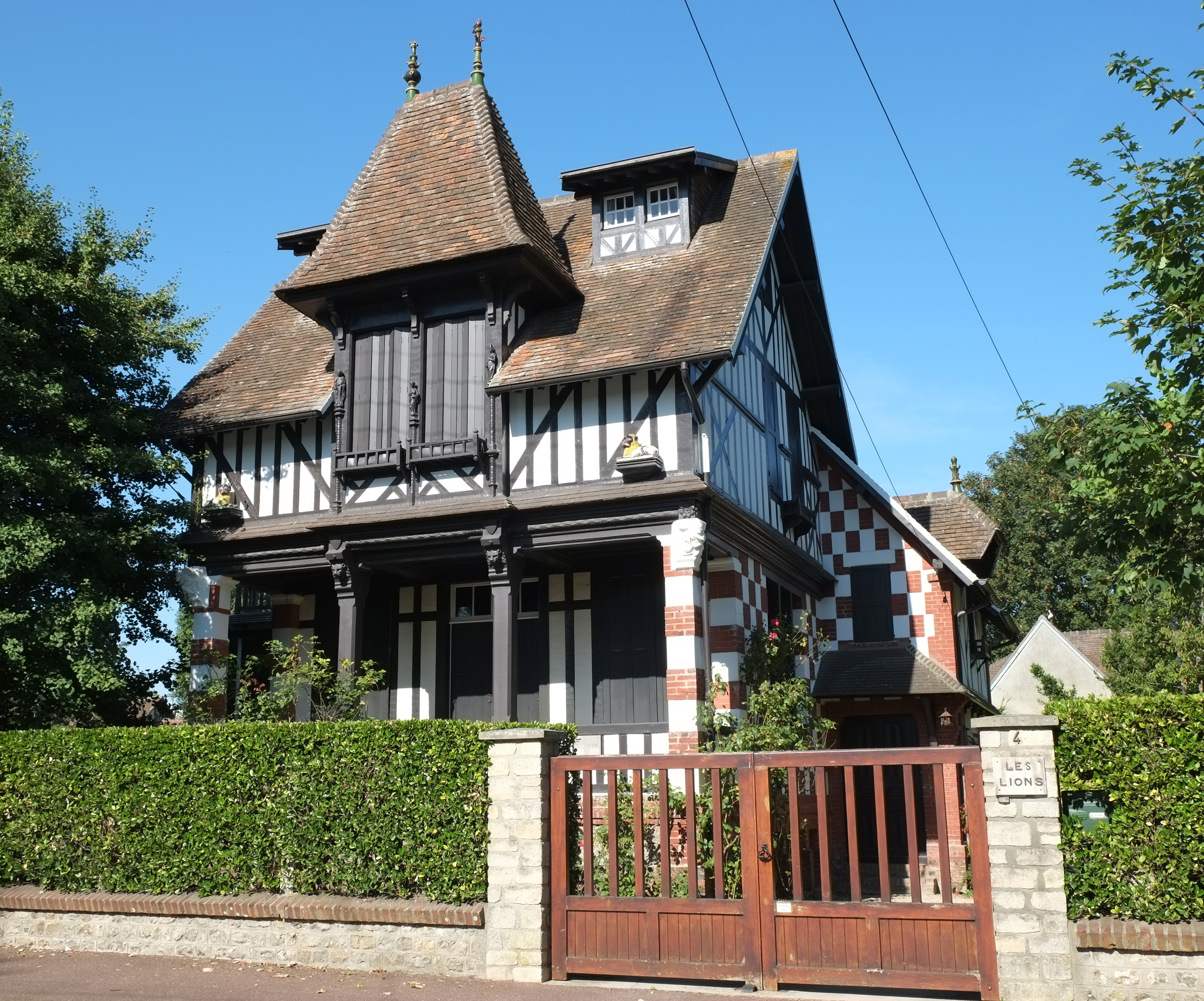 Villa in Houlgate im Département Calvados in Frankreich